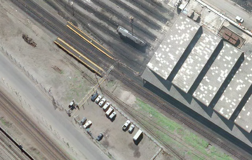 Pequeña estación para uso del personal del F.C. San Martín